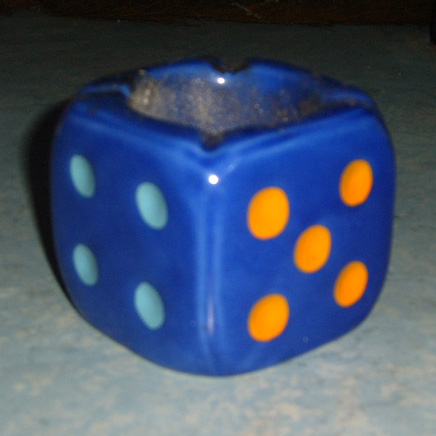 Ashtray